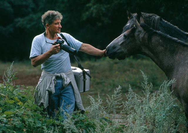 Tomáš Míček s koněm, svým oblíbeným fotografickým námětem